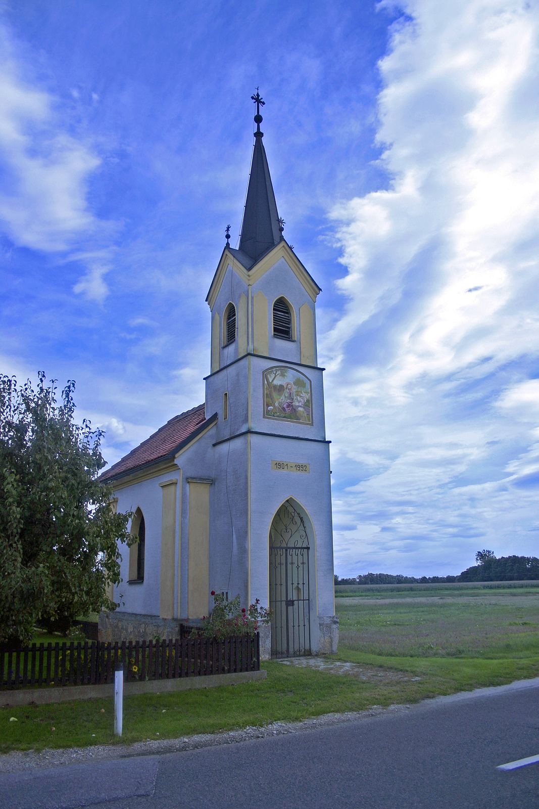 Kapela v čast Janezu Krstniku, Sodišinci. Chapel in John the Baptist honour, Sodišinci. Kapelle in Johannes der Täufer Ehre, Sodišinci.